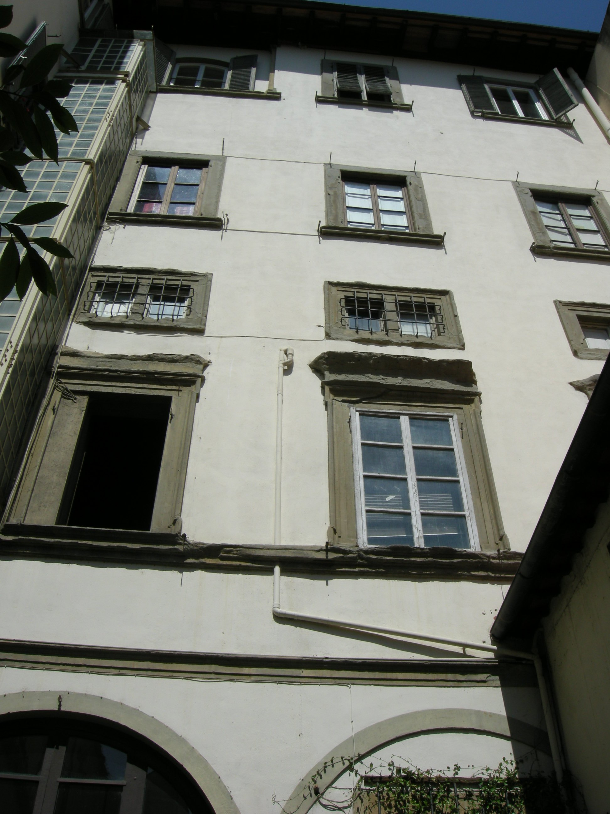 Palazzo mellini fossi, controfacciata